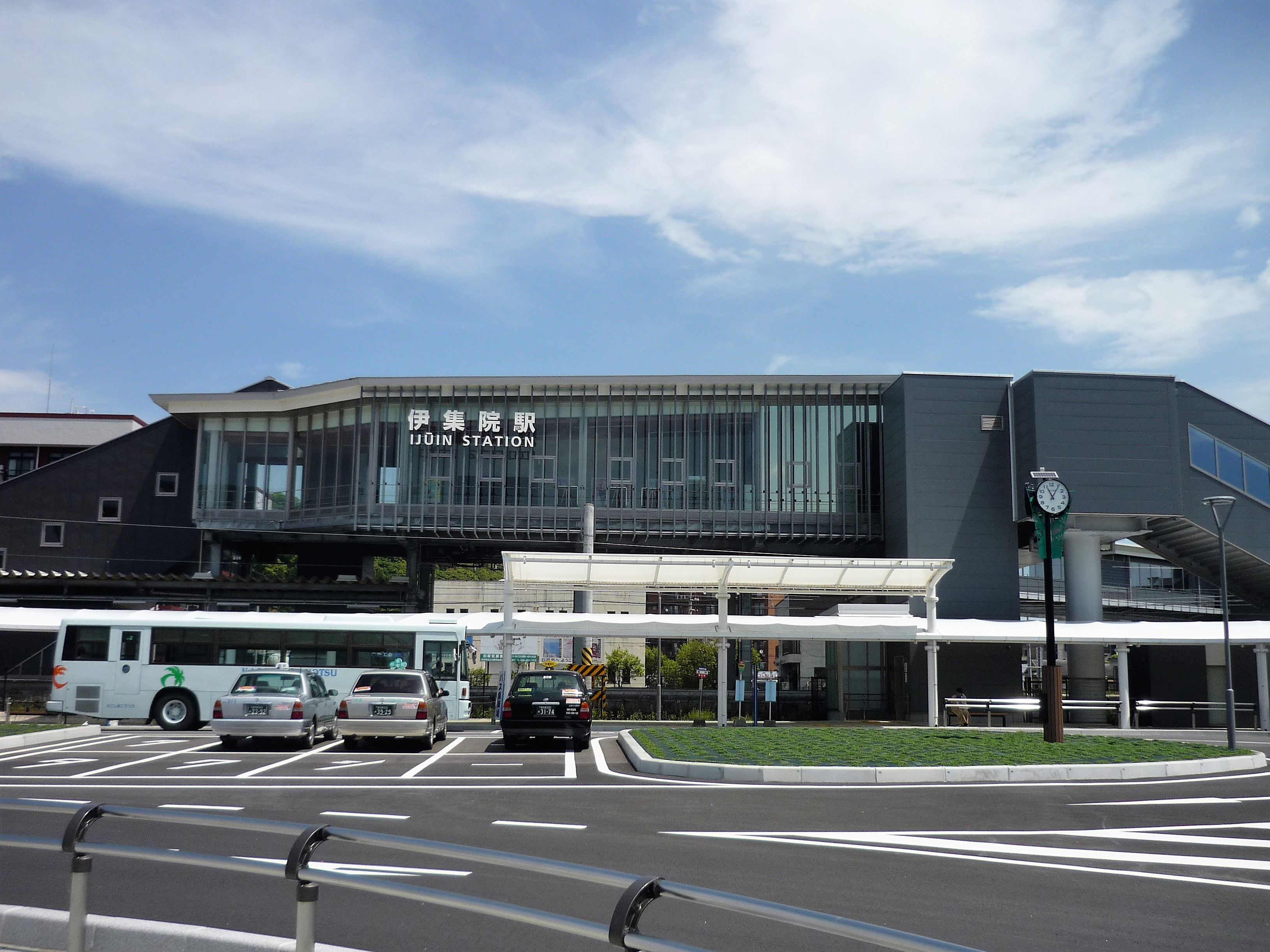 伊集院駅南口（2018年5月） Panasonic Lumix DMC-FS3